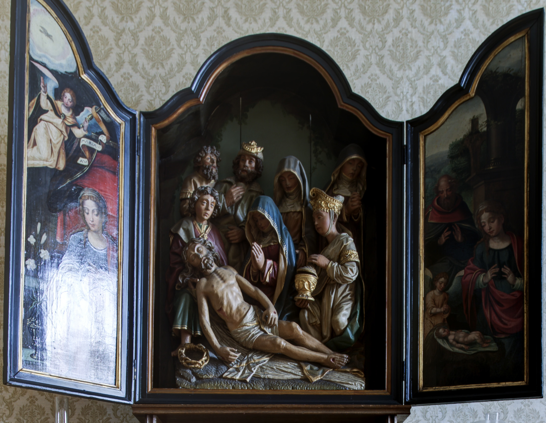 Houtsnijwerk uit het atelier van Jan van Steffeswert.